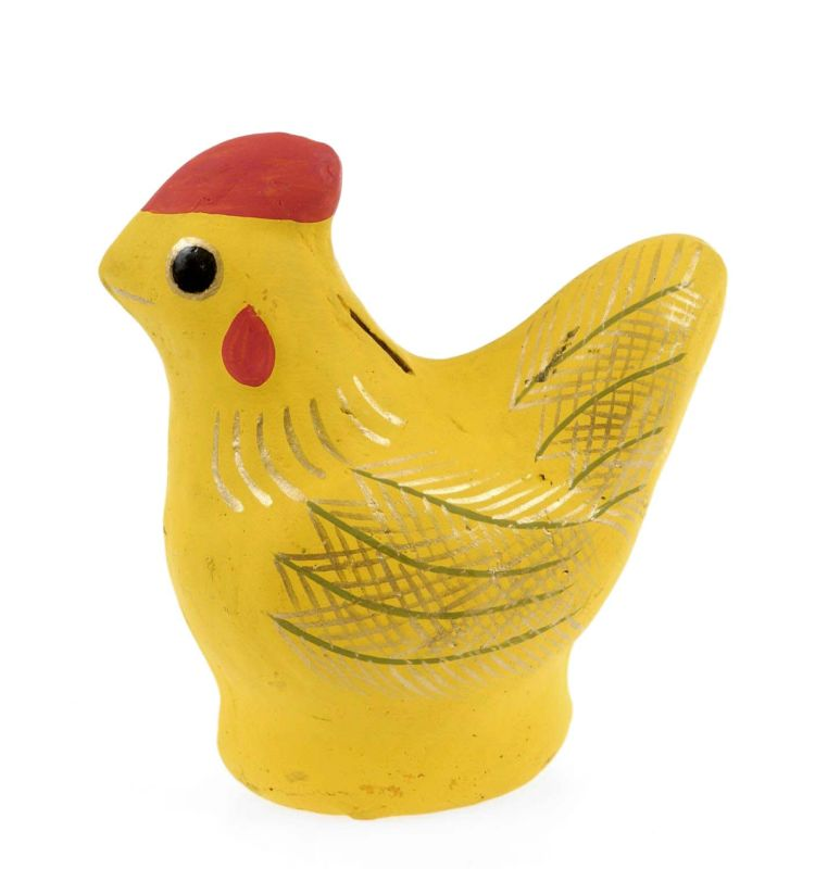 Spaarpot. Aardewerken spaarpot in de vorm van een zittende kip